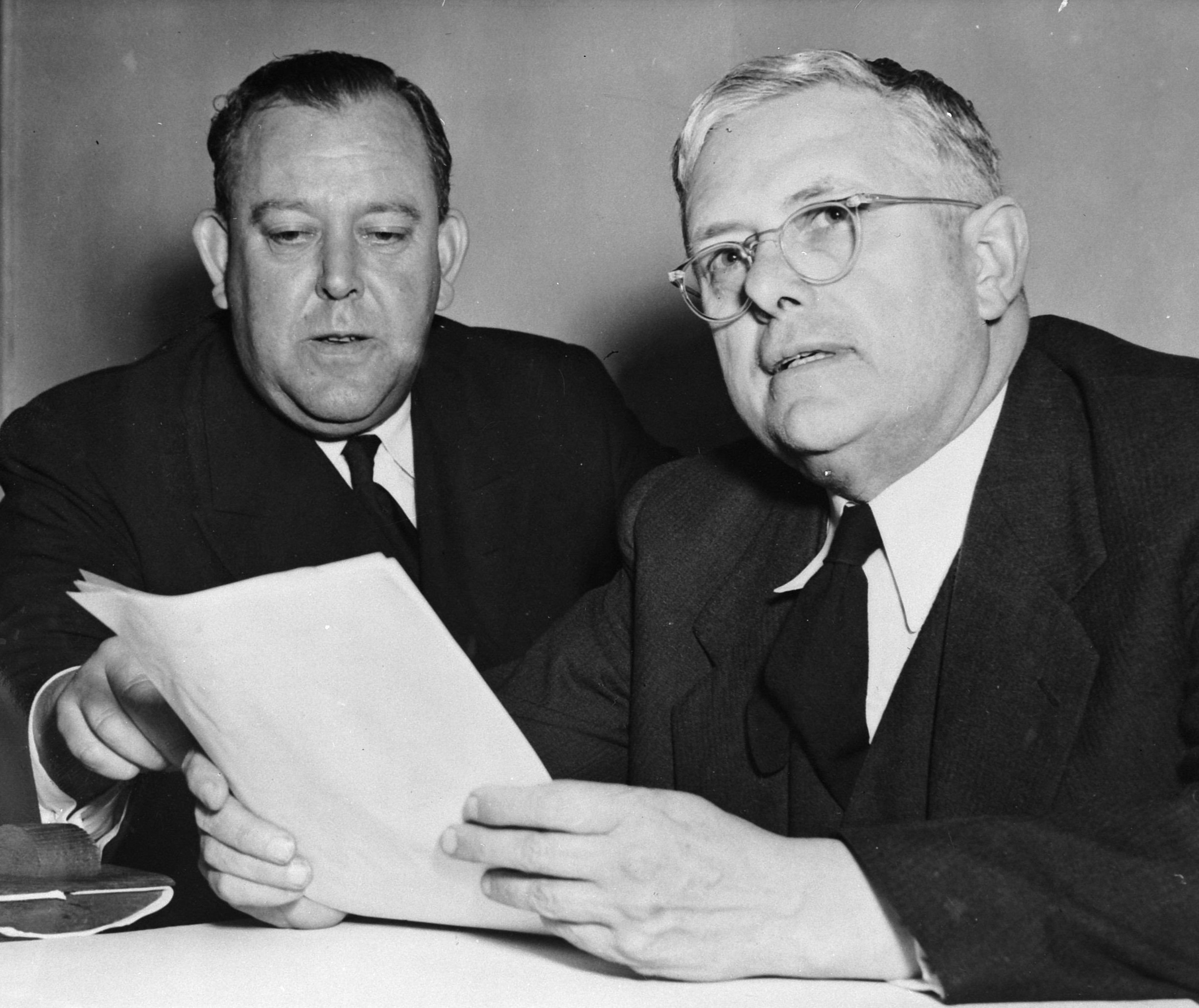 Collectie / Archief : Fotocollectie Anefo Reportage / Serie : [ onbekend ] Beschrijving : Trygve Lie en Evatt over Berlijnse kwestie Datum : 17 november 1948 Persoonsnaam : Trygve Lie Fotograaf : Fotograaf Onbekend / Anefo Auteursrechthebbende : Nationaal Archief Materiaalsoort : Glasnegatief Nummer archiefinventaris : bekijk toegang 2.24.01.09 Bestanddeelnummer : 903-1006